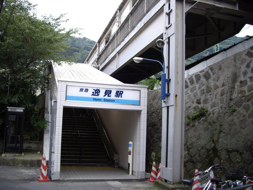 逸見駅入口